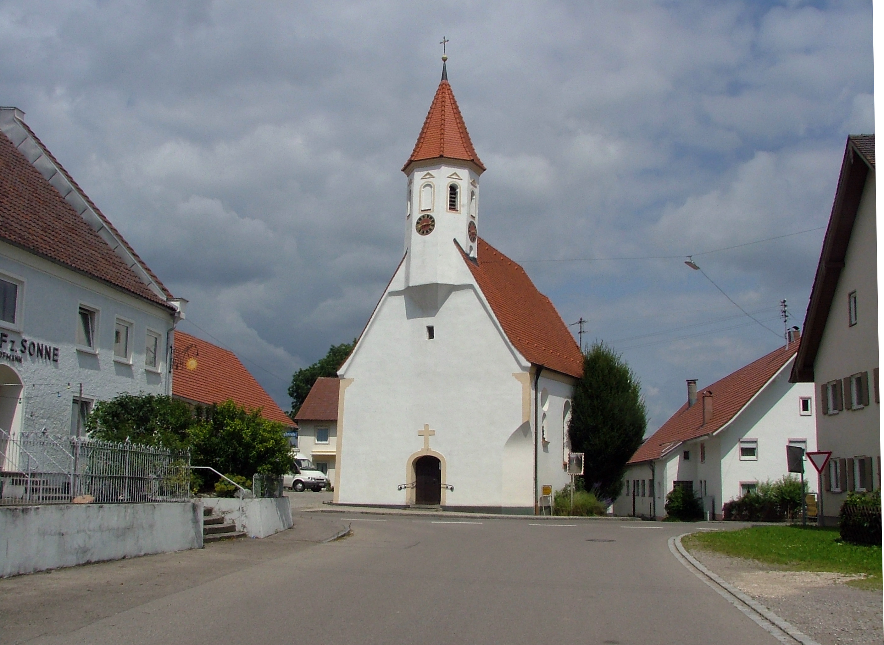 Oberschönegg